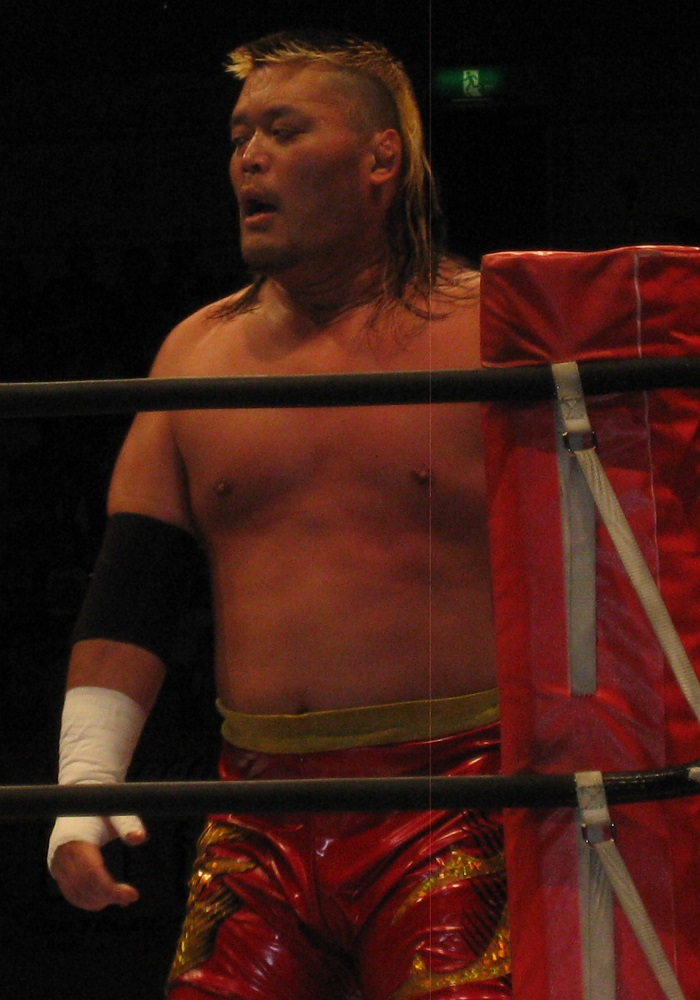 2014年6月21日 大阪府立体育会館 「DOMINION6.21」 天山広吉